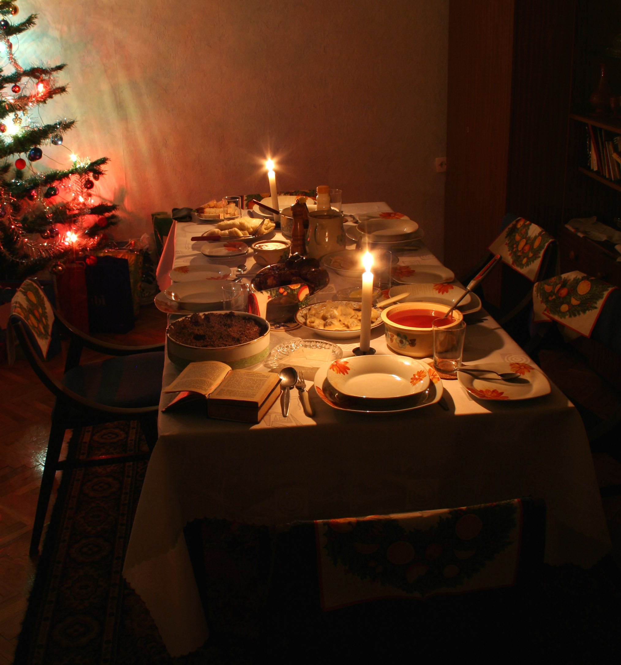 kolacja wigilijna - dania